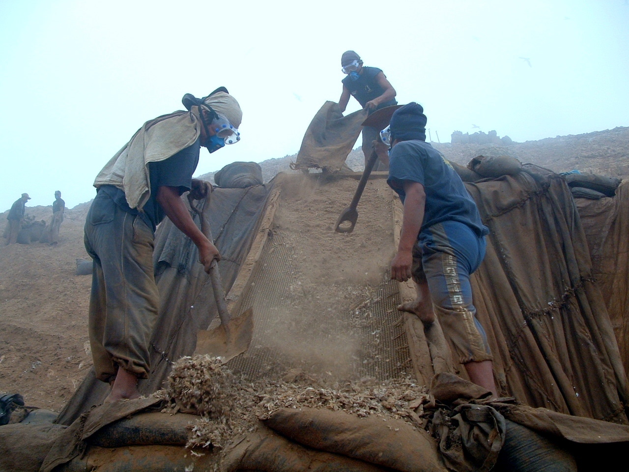 Trabajadores tamizando el Guano de Isla para su posterior ensaque, foto tomada en la Isla Guañape Norte.